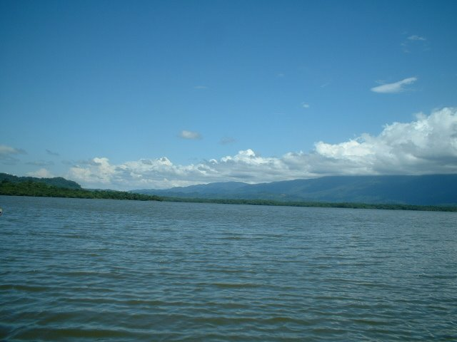 Vista del lago